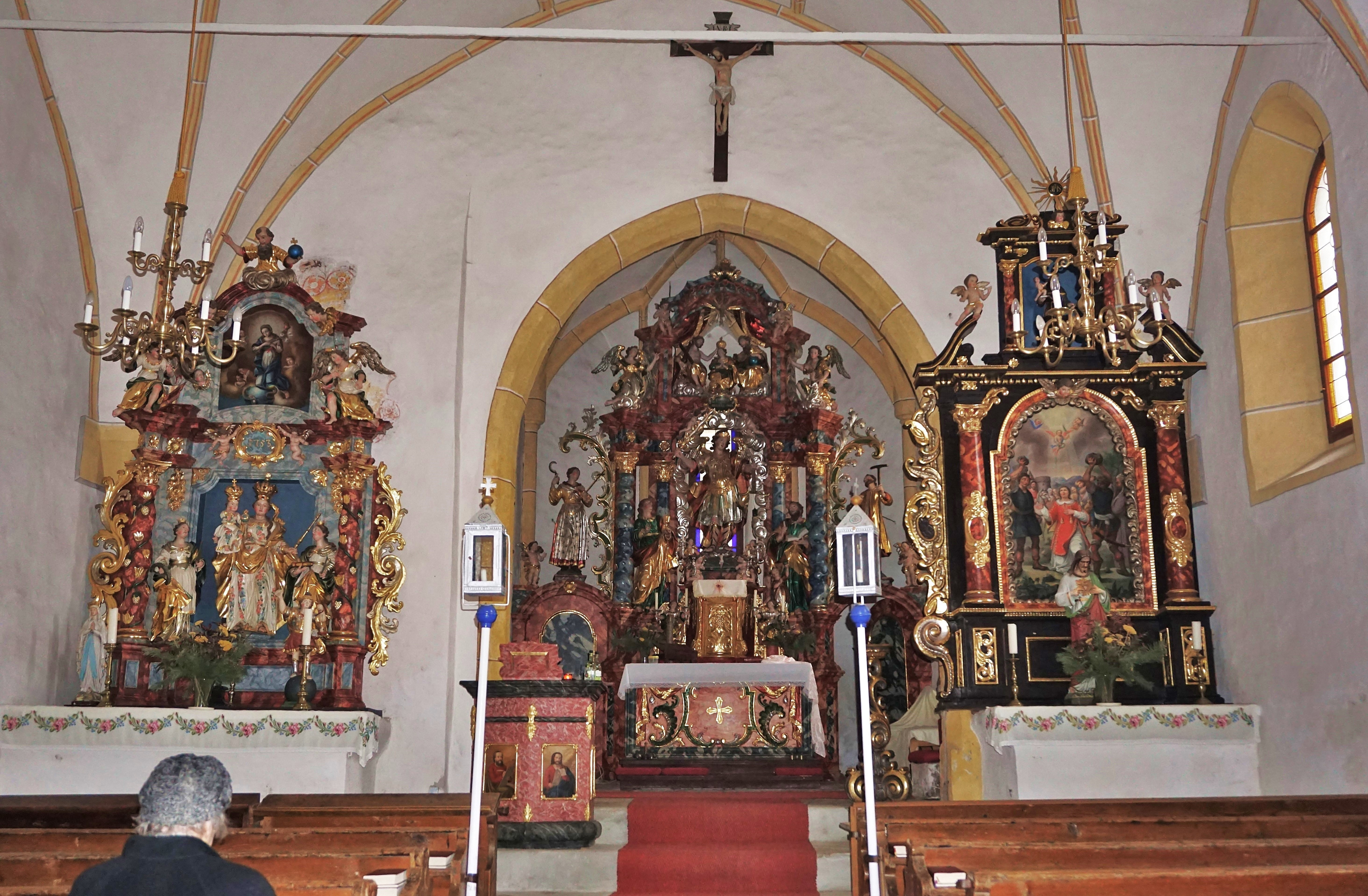 Kath. Filialkirche St. Michael in Gösseling, Innenansicht